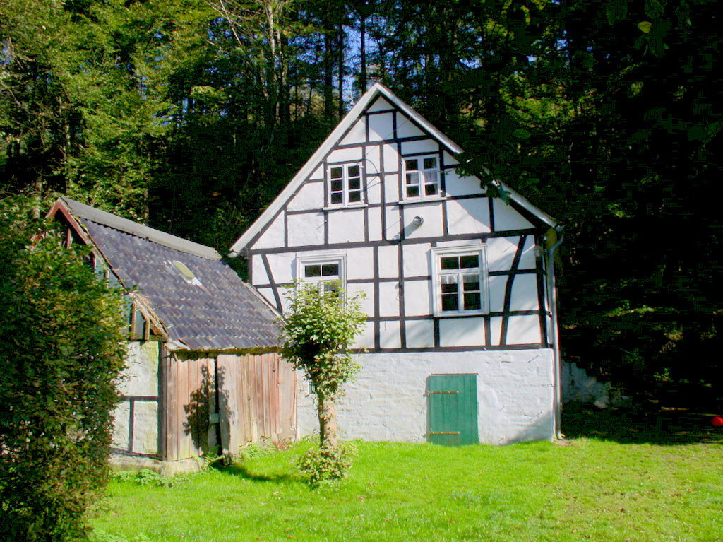 Der Diederichskotten im Hammertal in Remscheid.